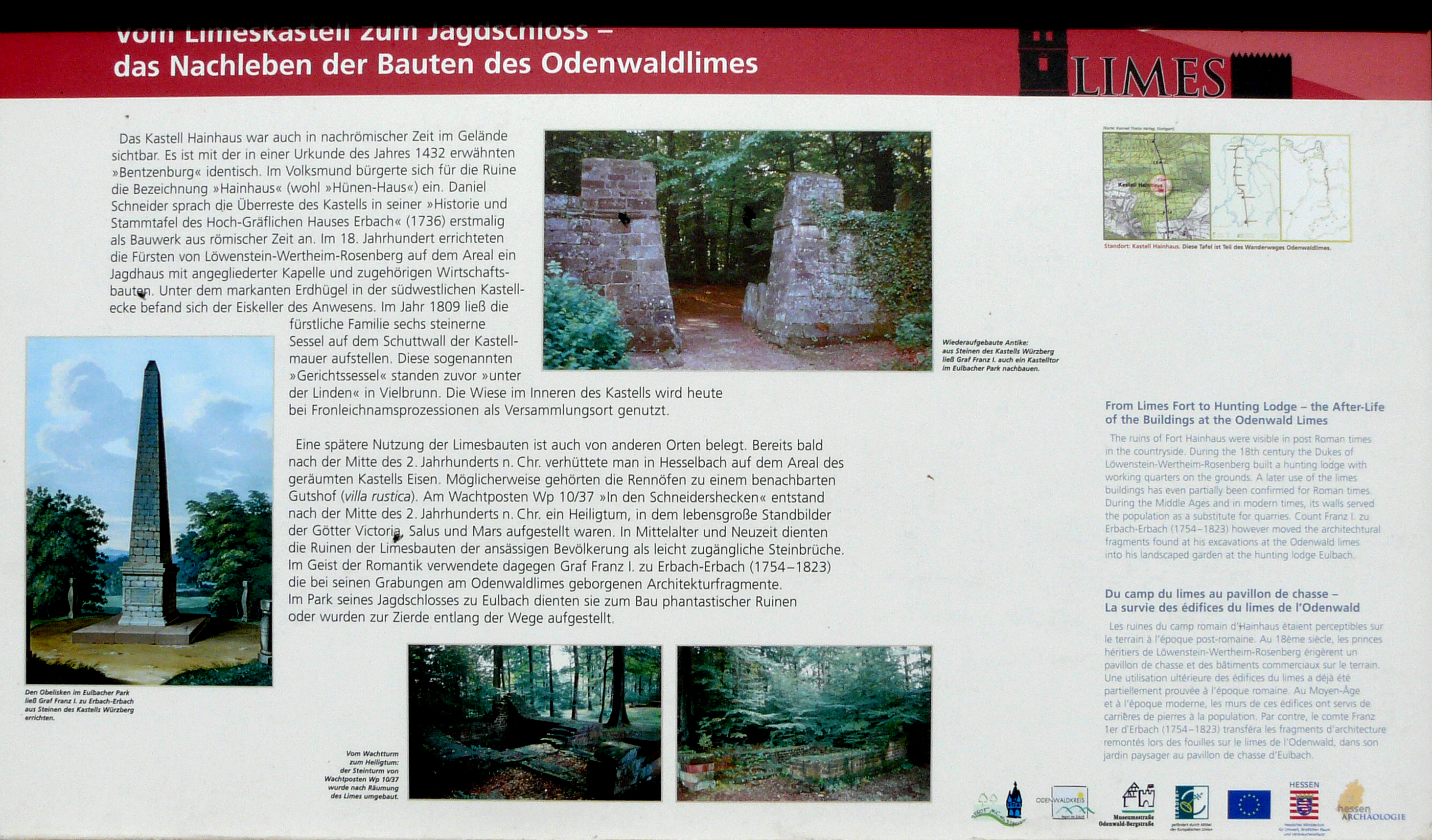 Infotafel beim Kastell Hainhaus am Odenwaldlimes